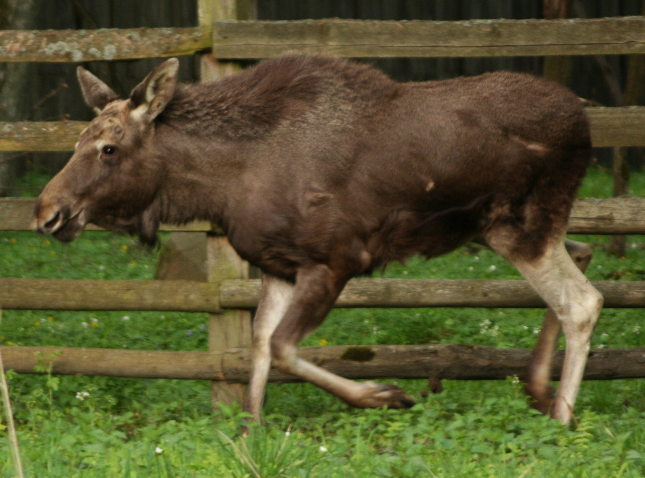 Alces_alces